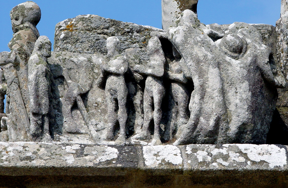 Saint-Jean-Trolimon (Bretagne, Finistère) Calvaire bei der Kapelle Notre-Dame-de-Tronoën: Darstellung der Höllenfahrt Christi gemäß dem apokryphen Evangelium des Nikodemus, Kap. 17-26. Begegnung mit Adam und Eva.